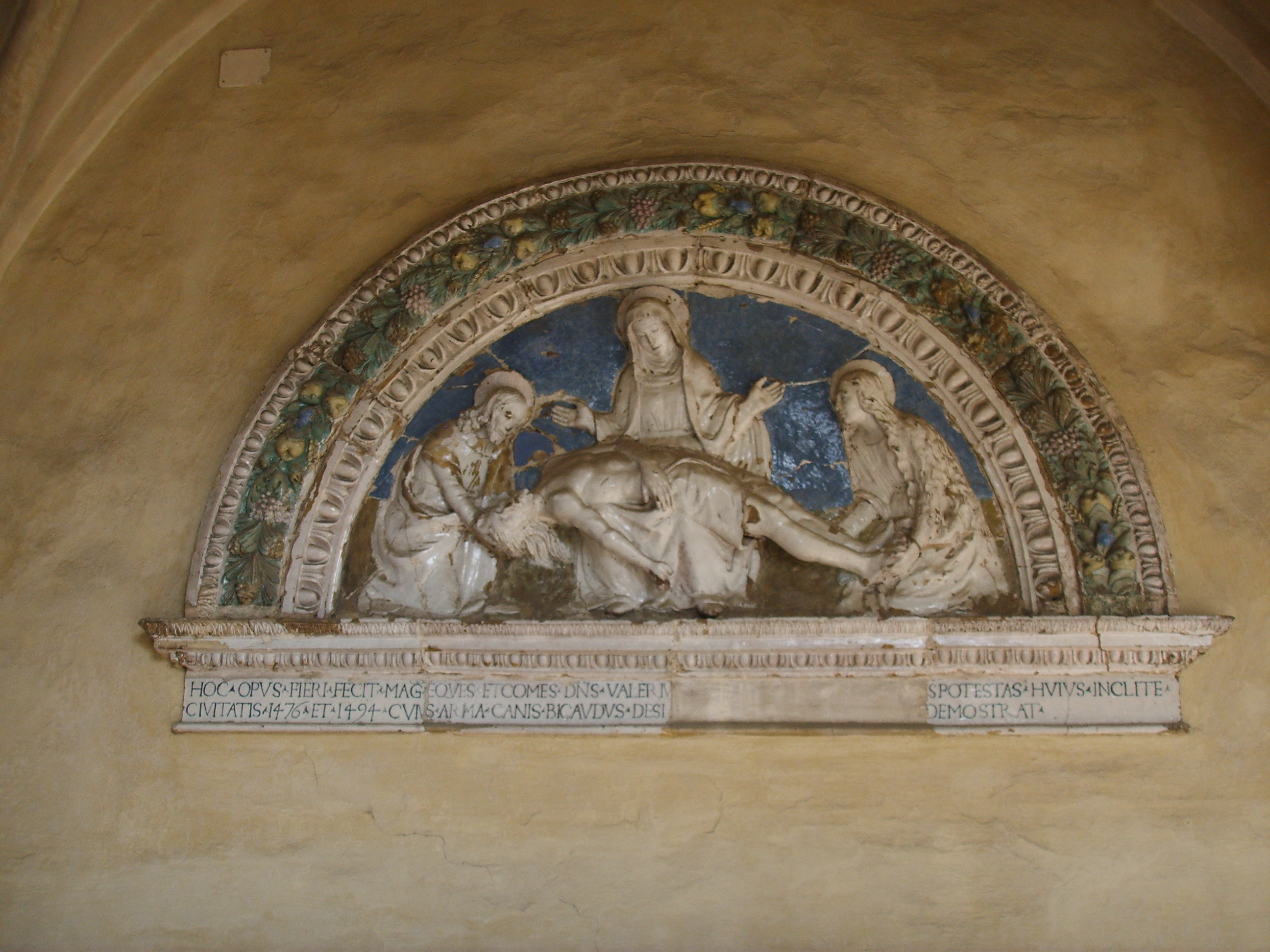 Santa Maria Nuova hospital, Giovanni della Robbia's, Florence, Italy